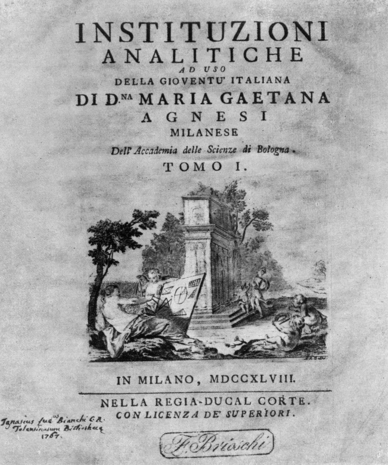 Il frontispizio delle Instituzioni analitiche dell' Agnesi